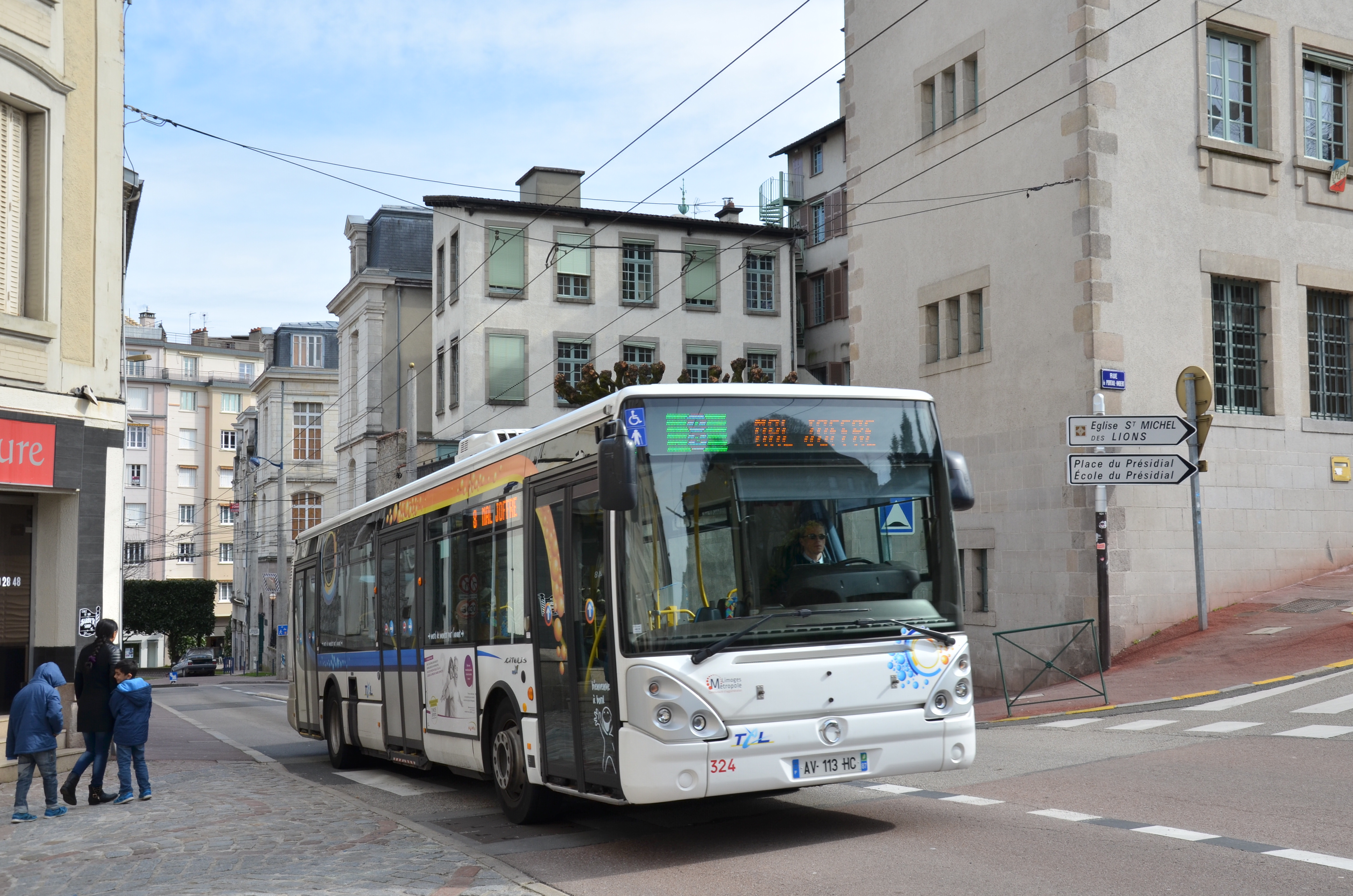 Irisbus Citelis 12 n°324 sur la ligne 8 du réseau TCL de Limoges, près de l'arrêt Adrien Dubouché.